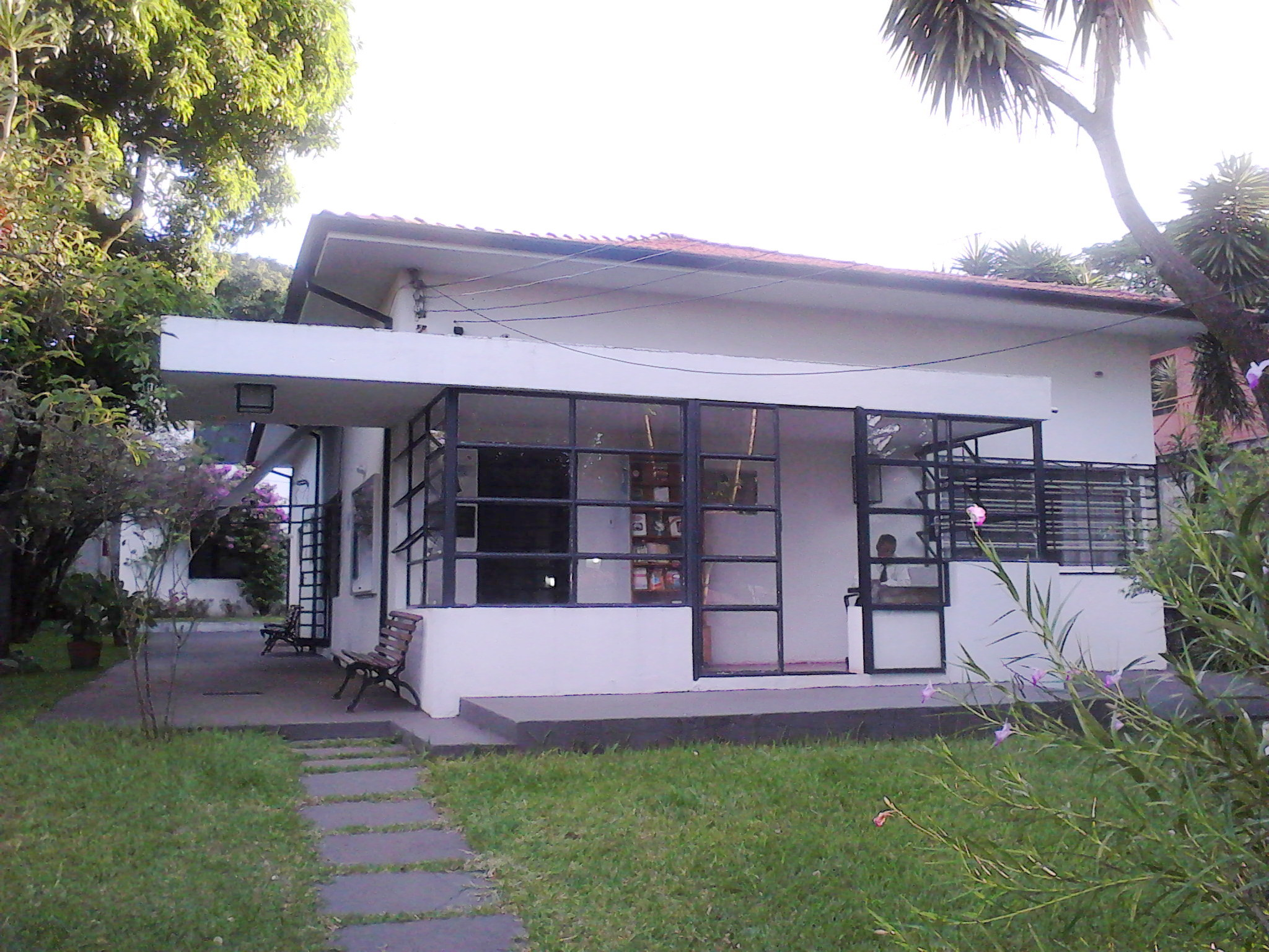 Centro Cultural e de Estudos Superiores Aúthos Pagano, na City Lapa, São Paulo, SP, Brasil.